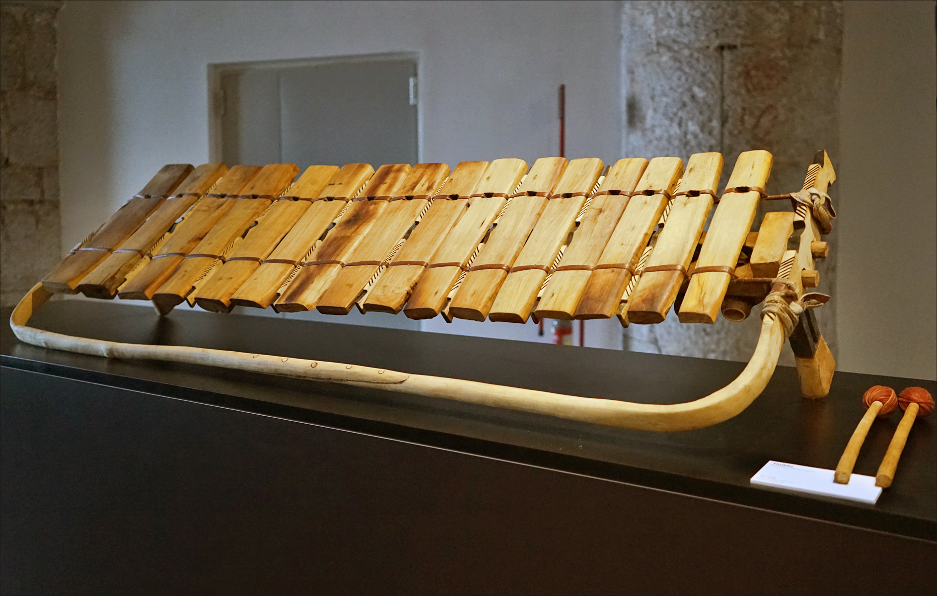 Timbila, xylophone en bois de cactus, Mozambique Estêvão nhacubine Le Mozambique est un pays qui compte 43 langues différentes. Ses traditions musicales et chorégraphiques populaires sont très riches et le chopi Timbila a été inscrit au patrimoine mondial par l'Unesco. Pavillon national de la République du Mozambique "Coexistence of Tradition and Modernity in Contemporary Mozambique" Responsable du pavillon : Joel Matias Libombo. Responsable adjoint : Gilberto Paulino Cossa. Commissaire : Comissariado-Geral para a Expo Milano 2015. Site de l'Arsenal Biennale de Venise 2015 Fiche sur le Chopi Timbila, musique du sud du Mozambique, inscrit au patrimoine culturel immatériel (PCI) de l'Unesco